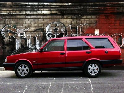 Tofas Kartal ("Adler") vor einer Mauer